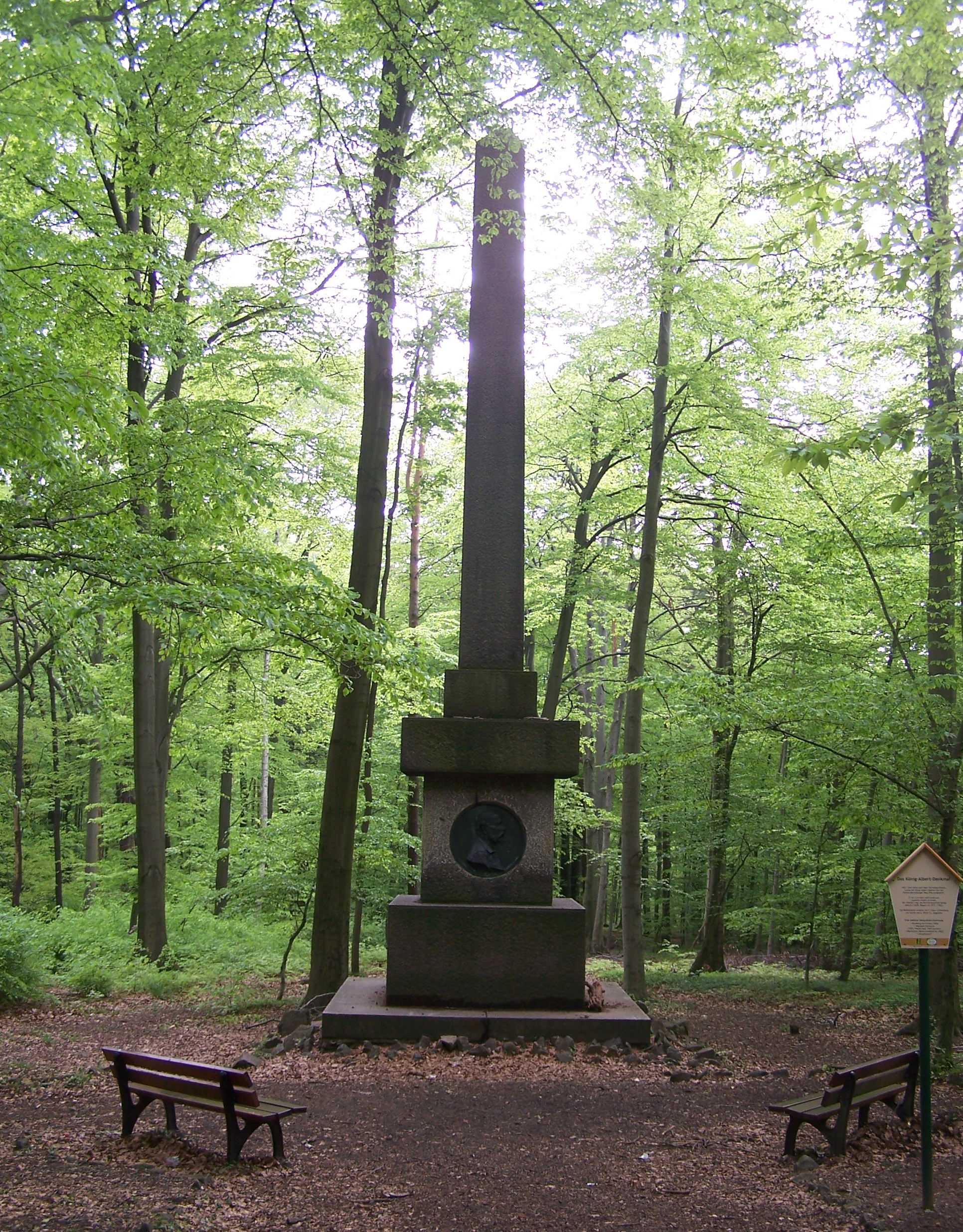 König-Albert-Obelisk im Albertpark im Südwesten der Dresdner Heide